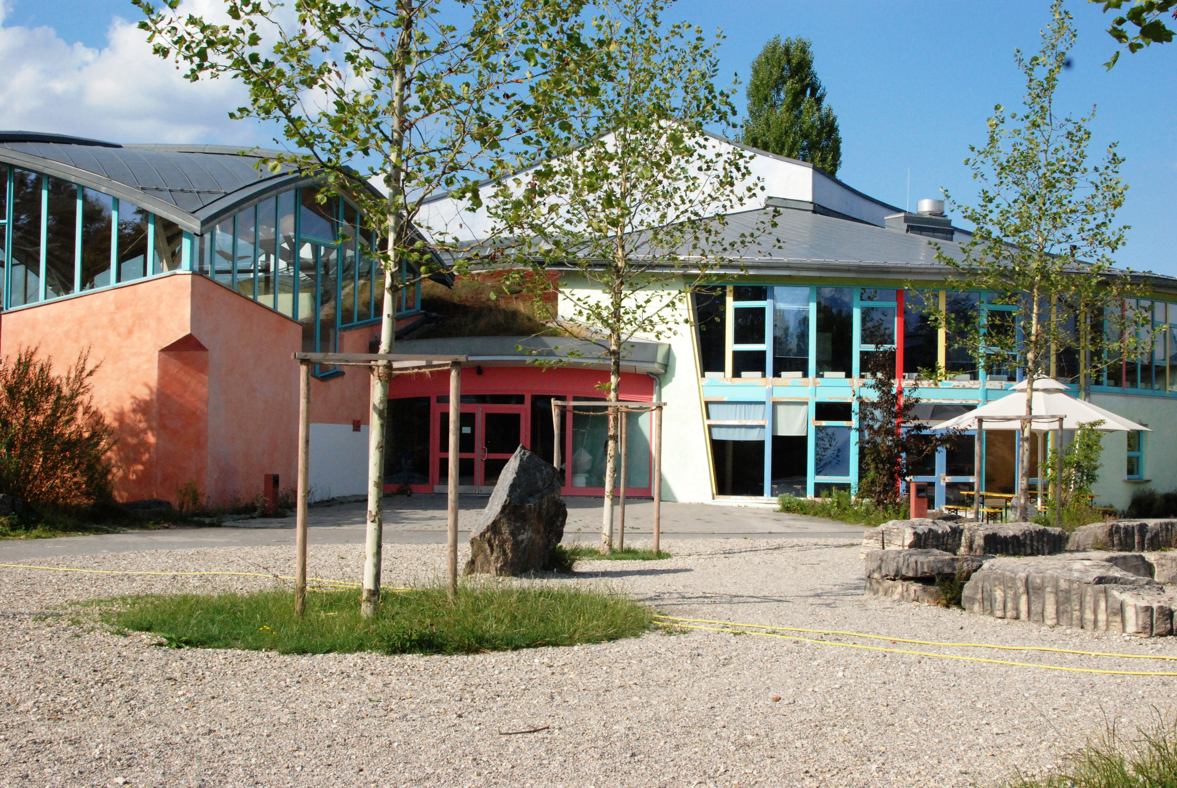 Waldorfschule in Ismaning (Rudolf-Steiner-Schule), Dorfstr.77, Landkreis München, Regierungsbezirk Oberbayern, Bayern.